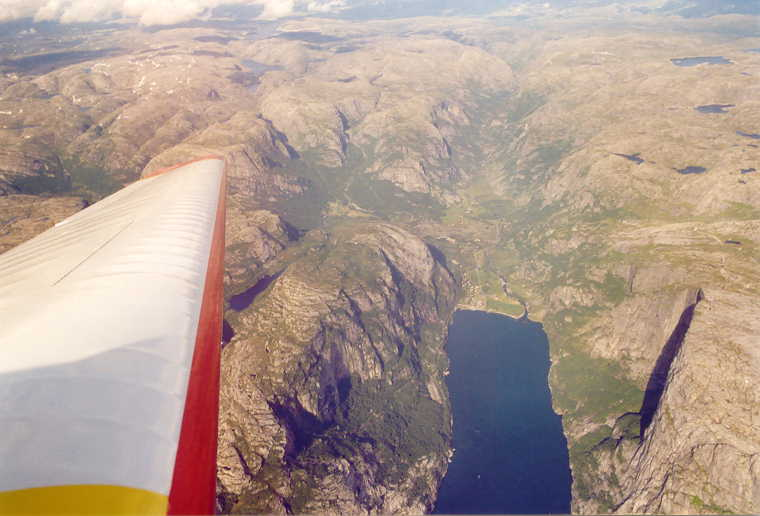 Beschreibung: Lysefjord vom Flieger aus betrachtet Quelle: Selbst fotografiert Fotograf / Zeichner: Pegasus2